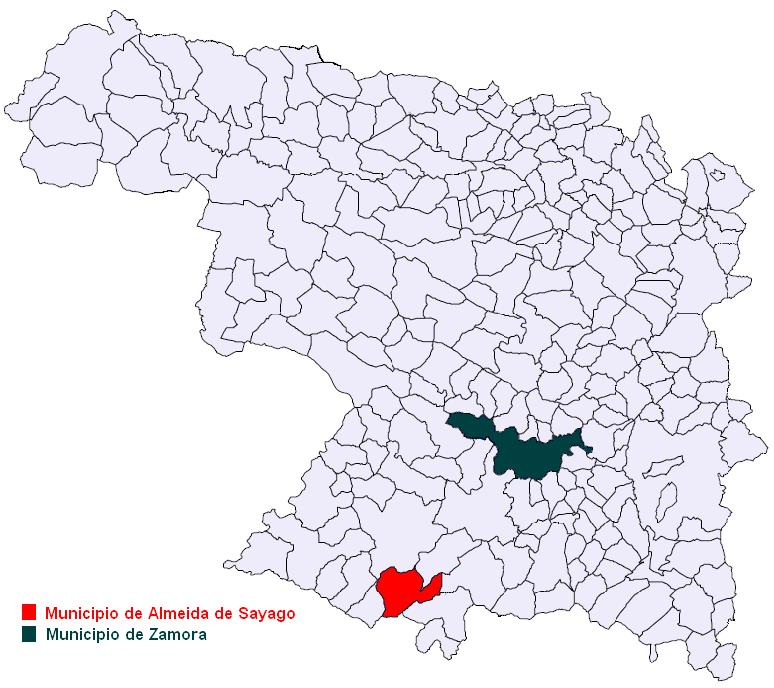 Almeida de Sayago en la provincia de Zamora, España.